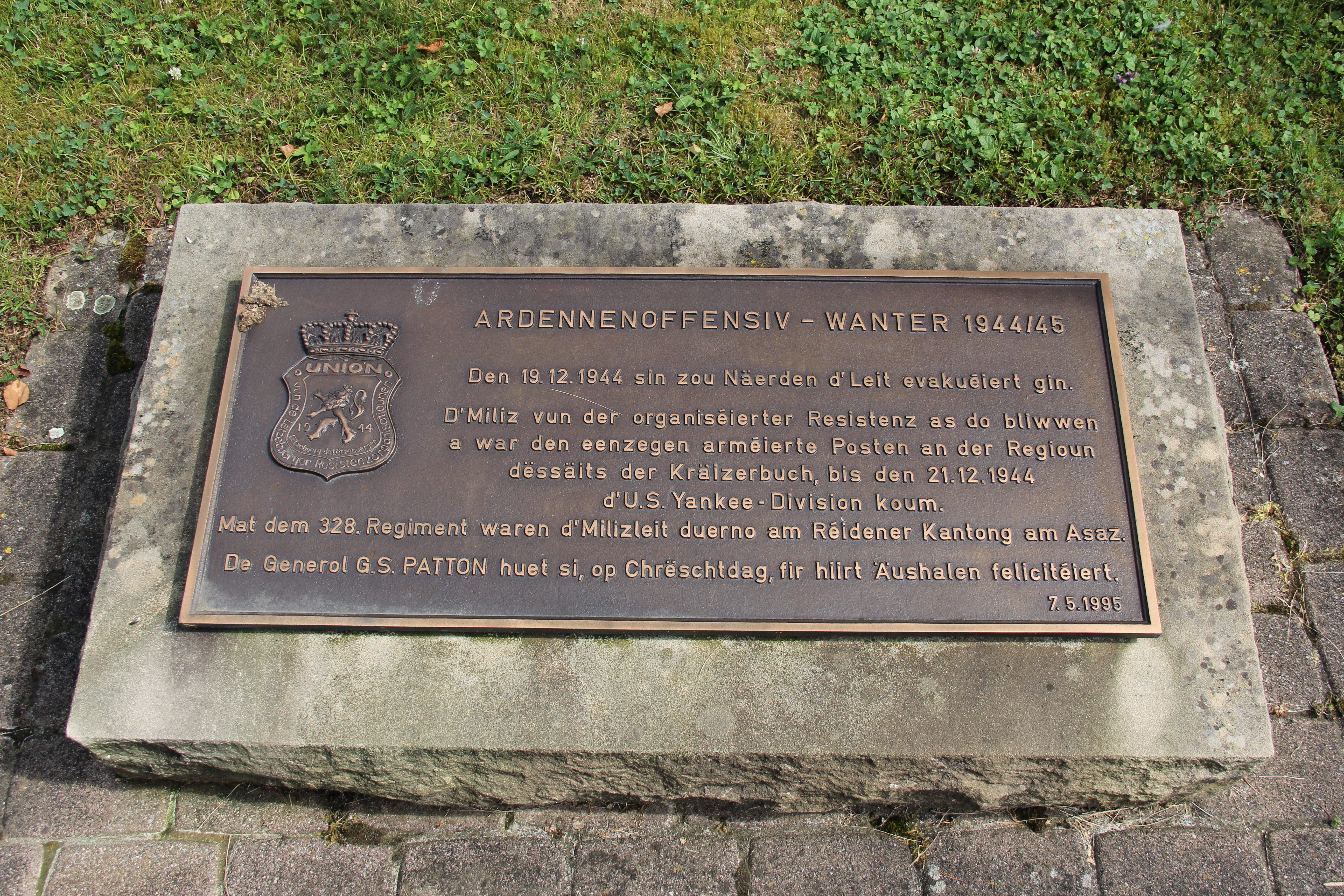 D'US-Monument zu Näerden um Kierfecht, agweit de 7. Mee 1995; Text: "Ardennenoffensiv - Wanter 1944-45. Den 19.12.1945 sin zu Näerden d'Leit evakuéiert gin. D'Miliz vun der organiseierter Resistenz as do bliwwen a war deen eenzegen arméierte Posten an der Regioun dessaits der Kräizerbuch, bis den 21.12.1944 d'US. Yankee-Divisioun koum. Mat dem 328. Regiment waren d'Milizleit duerno am Réidener Kantong am Asatz. De Generol G.S. Patton huet si, op Chreschtdag, fir hiiert Aushalen féliciteiert. 7.5.1995"